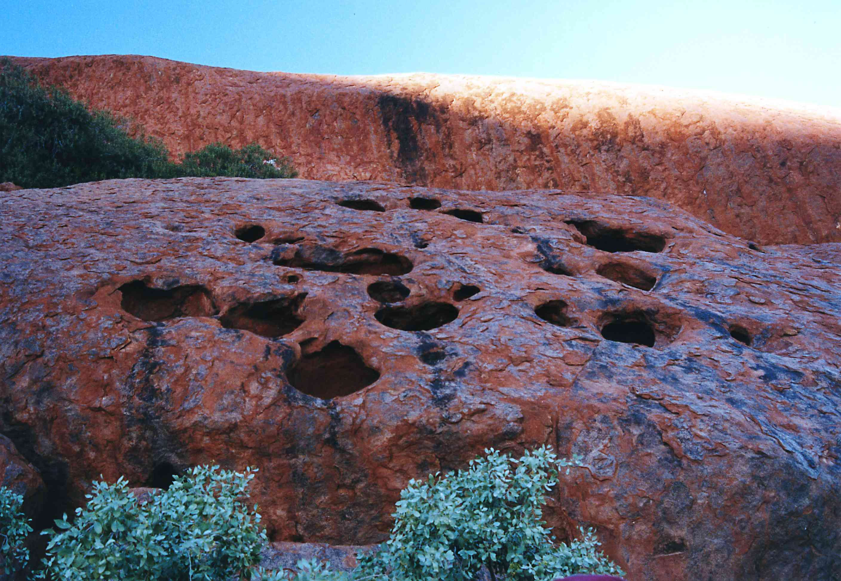 Fenomeni corrosivi sulla superficie di Uluru. Foto scattata da me, cedo sotto GFDL